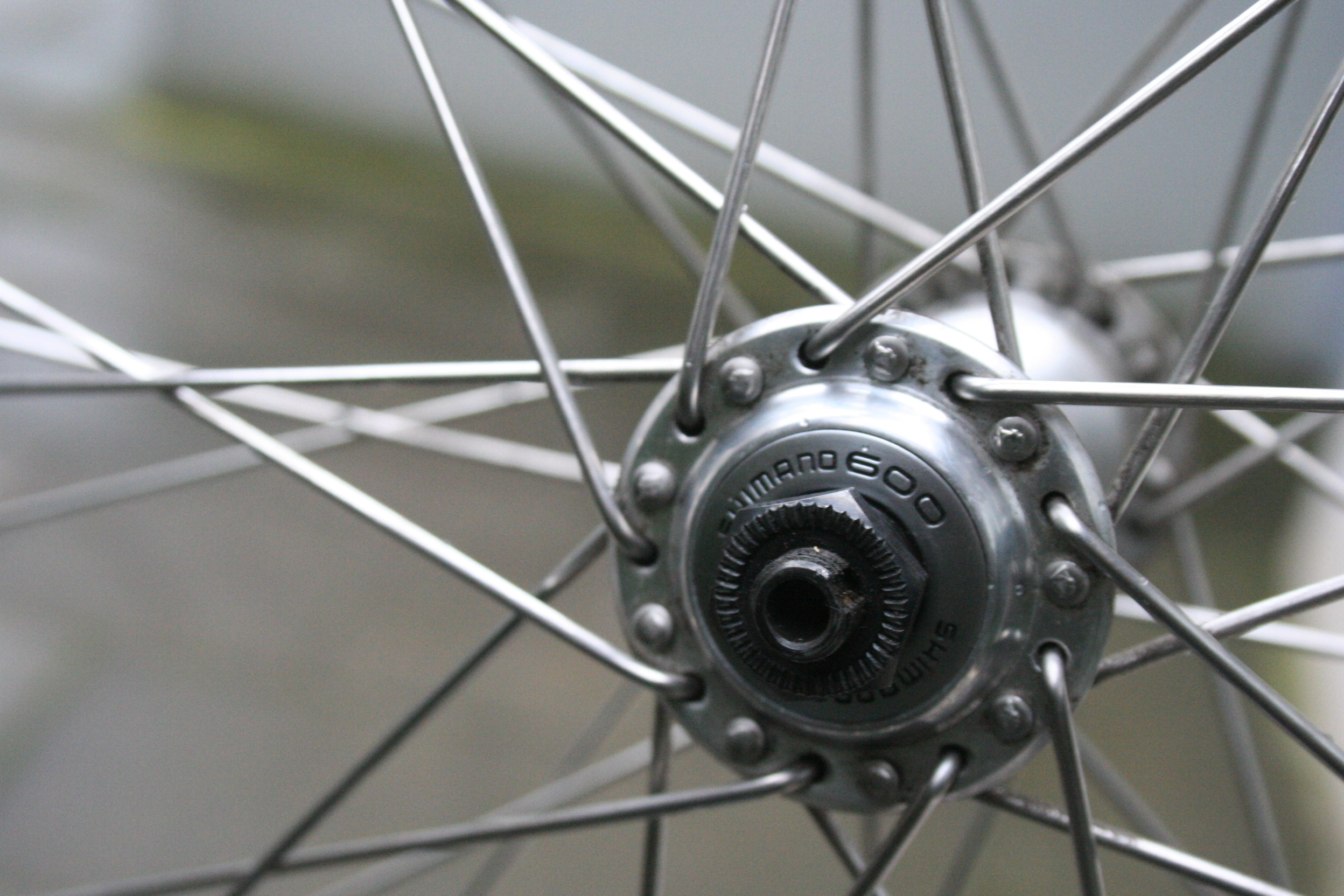 Nabe eines Shimano 600 Laufradsatzes